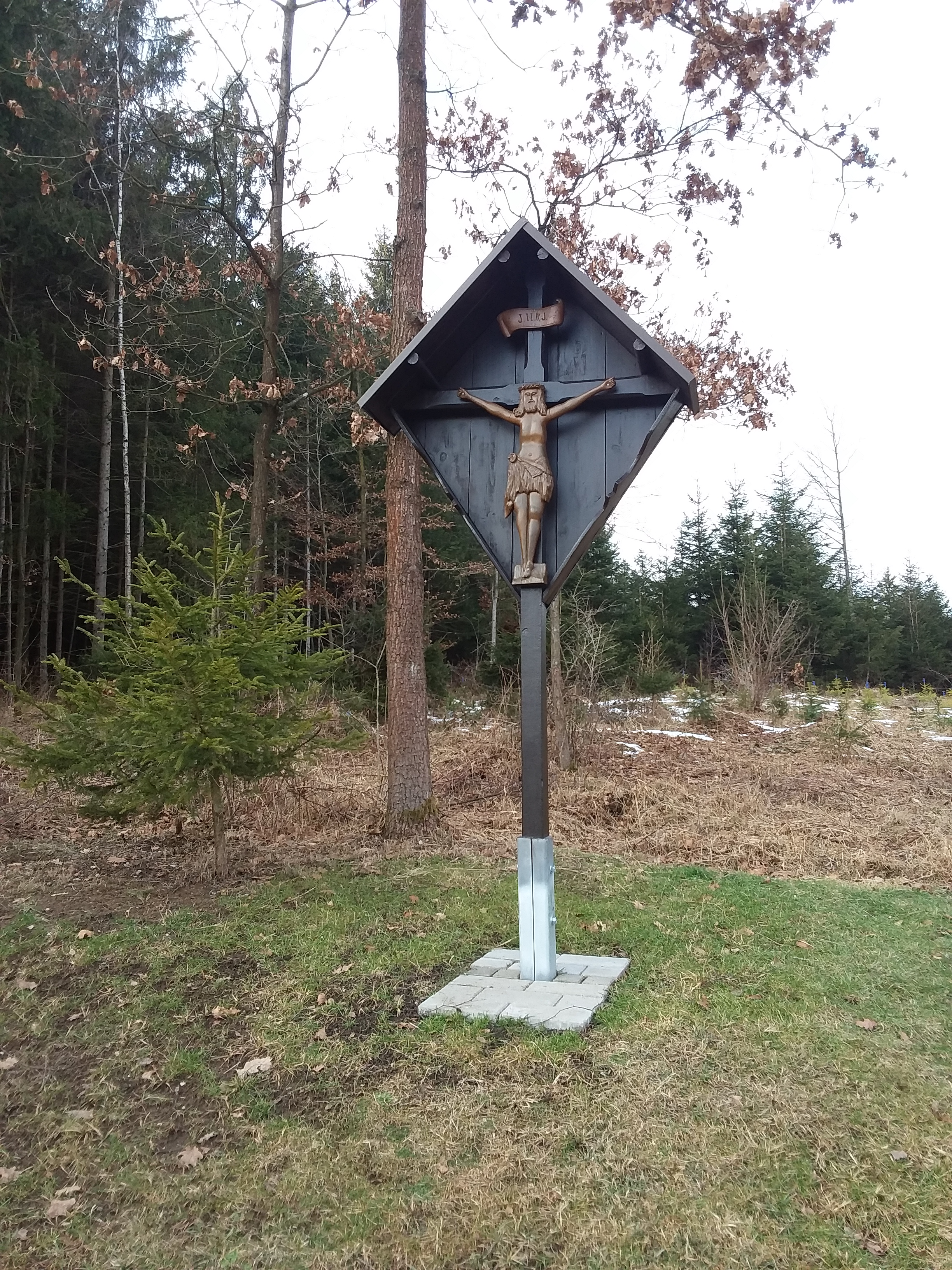 Hacklsberg, Ortsteil von Deining im Landkreis Neumarkt in der Oberpfalz, Ortskreuz